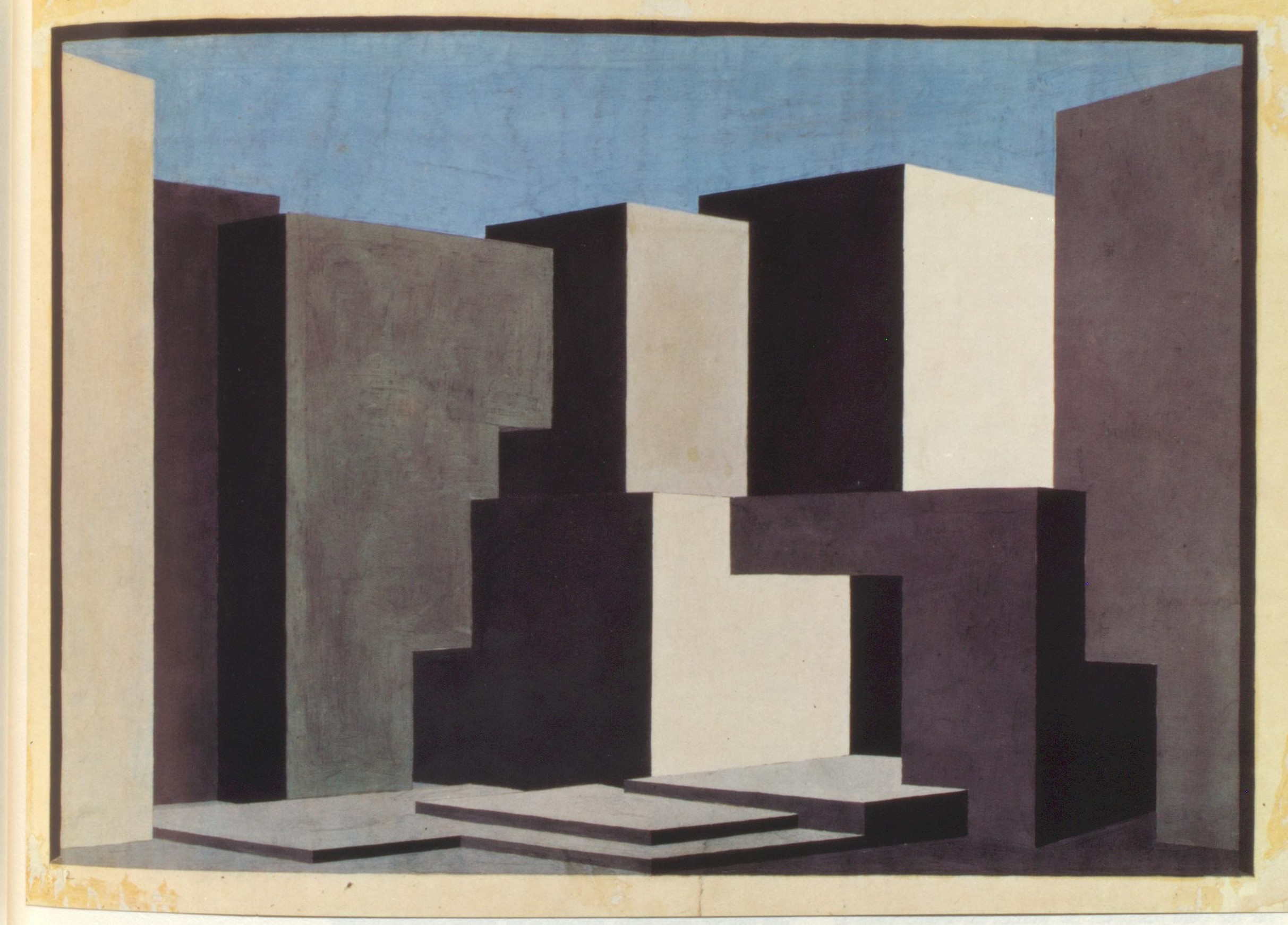 Ewald Dülberg Bühnenbildentwurf zu Fidelio 2. Bild Krolloper 1927